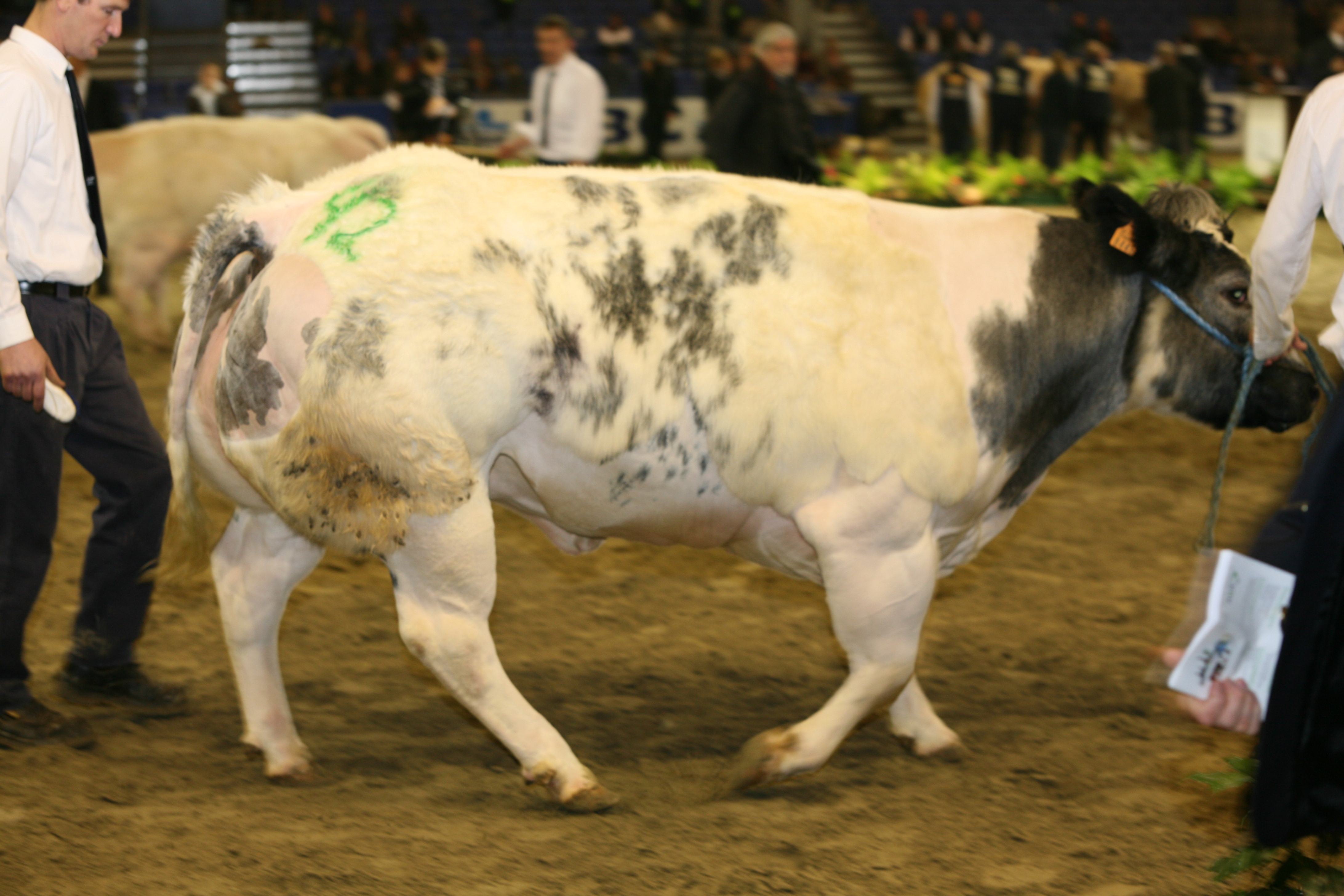 Agriflanders 2007 - vleesvee